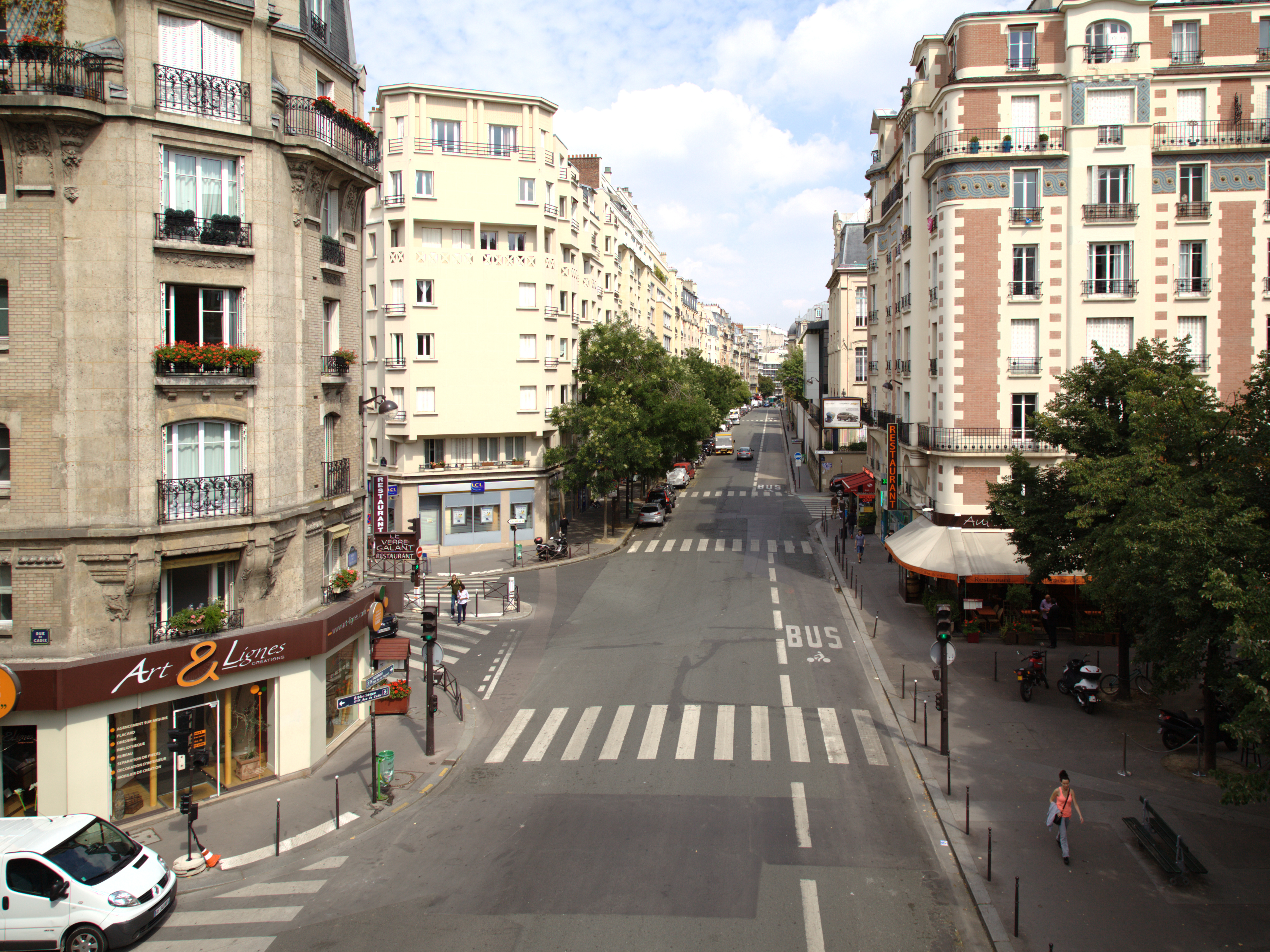 La vue de Vaugirard à Paris, vue depuis la Petite Ceinture en direction nord-est